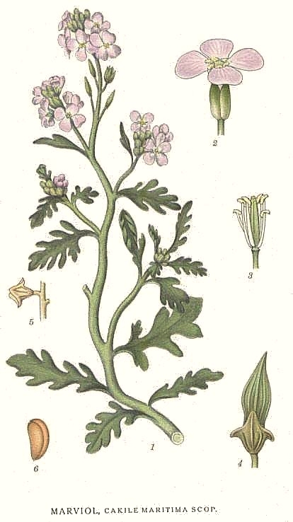 Original Description Marviol, Cakile maritima Scop.